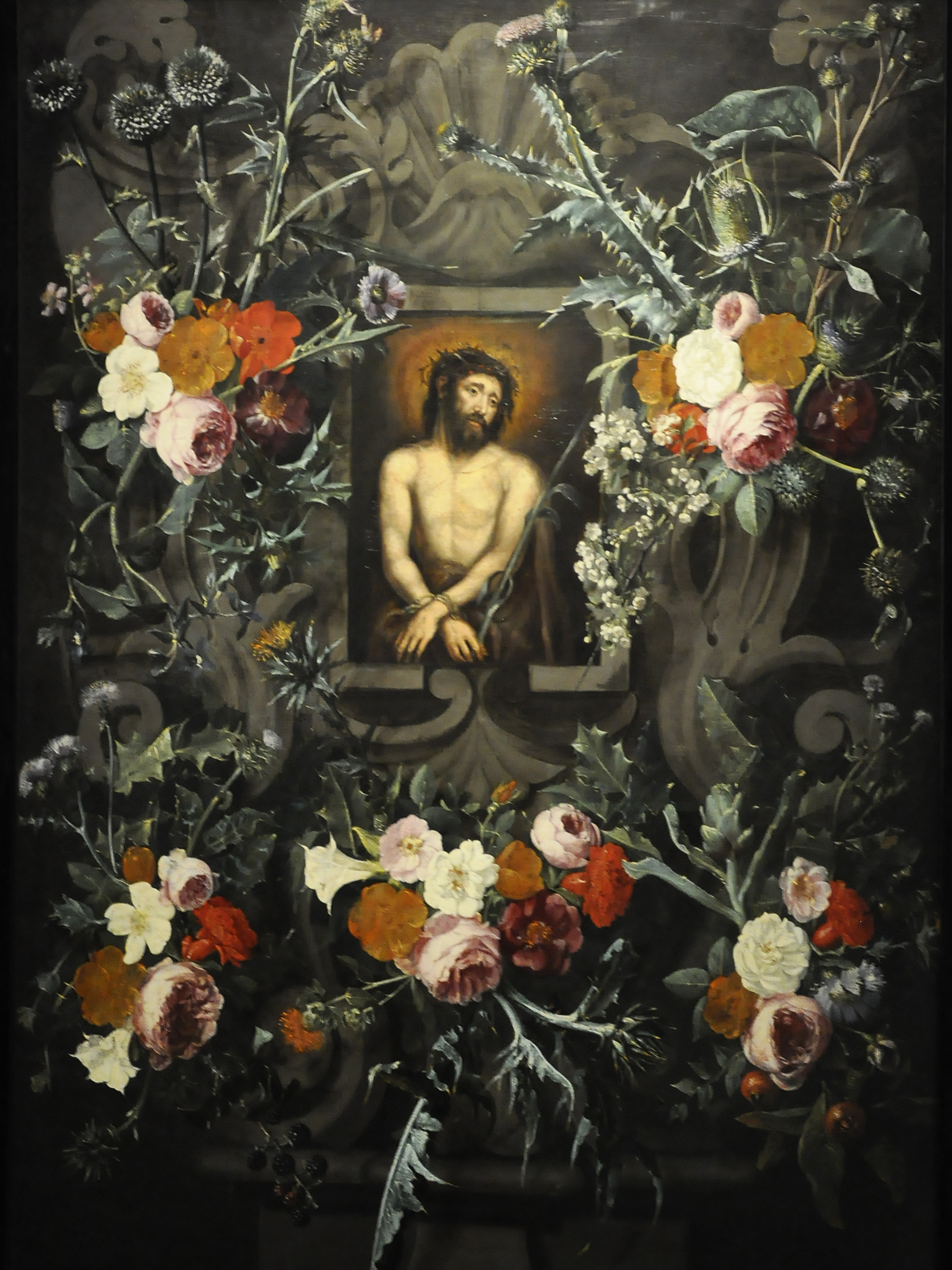 Gaspar Verbruggen de Oude (1635-1681) - Guirlande met Ecce Homo - Düsseldorf Museum Kunst palast